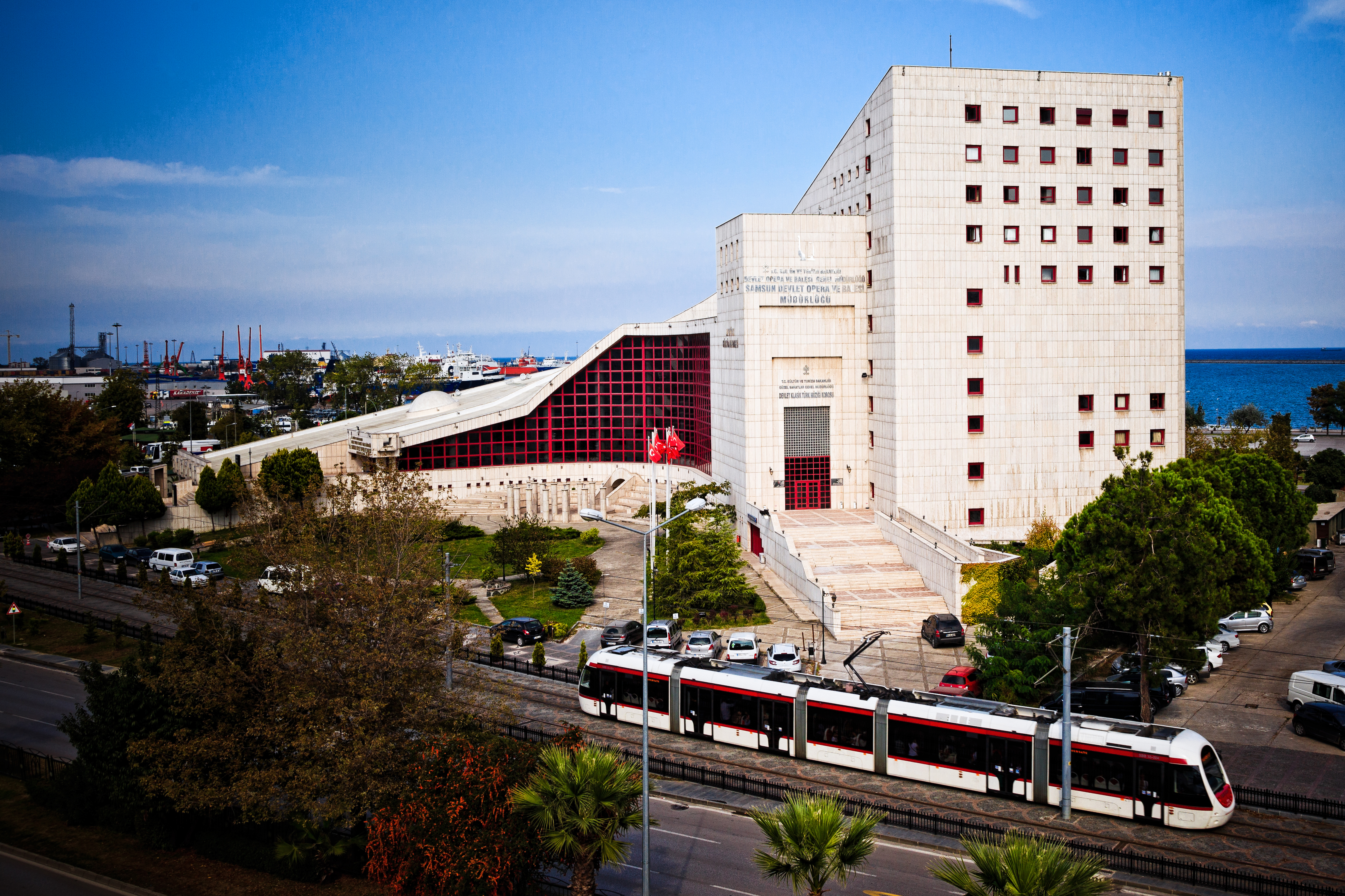 Samsun Devlet Opera ve Balesi Müdürlüğü